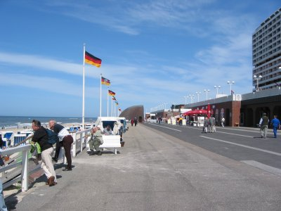 Promenade in Westerland (Foto von Magnus Manske geschossen) 13:29, 19. Jun 2003 Magnus Manske 400 x 300 (25.199 Byte) (Promenade in Westerland (Foto von mir geschossen))